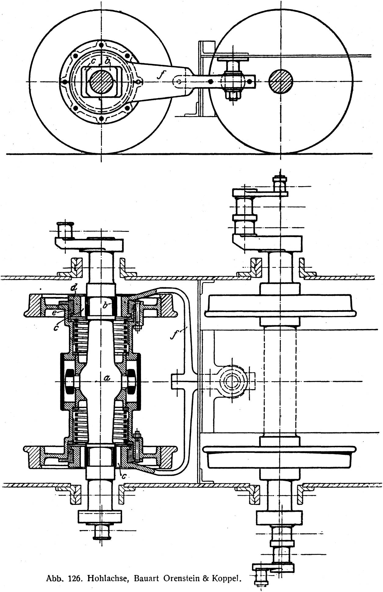 Hohlachsensystem, Bauart Orenstein & Koppel (Weiterentwicklung von Klien-Lindner).